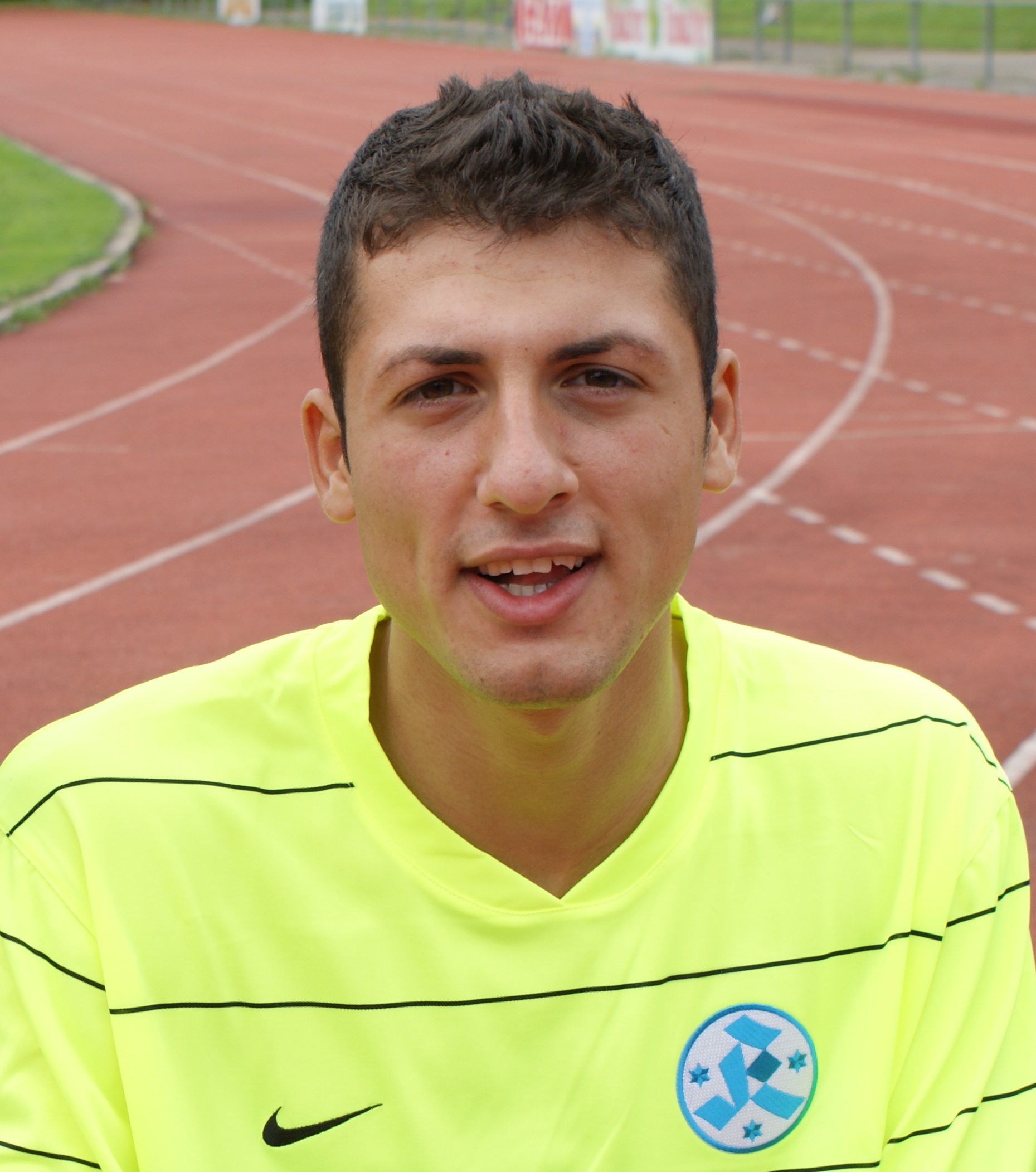 Gökhan Gümüşsu 2009 im Trikot der Stuttgarter Kickers